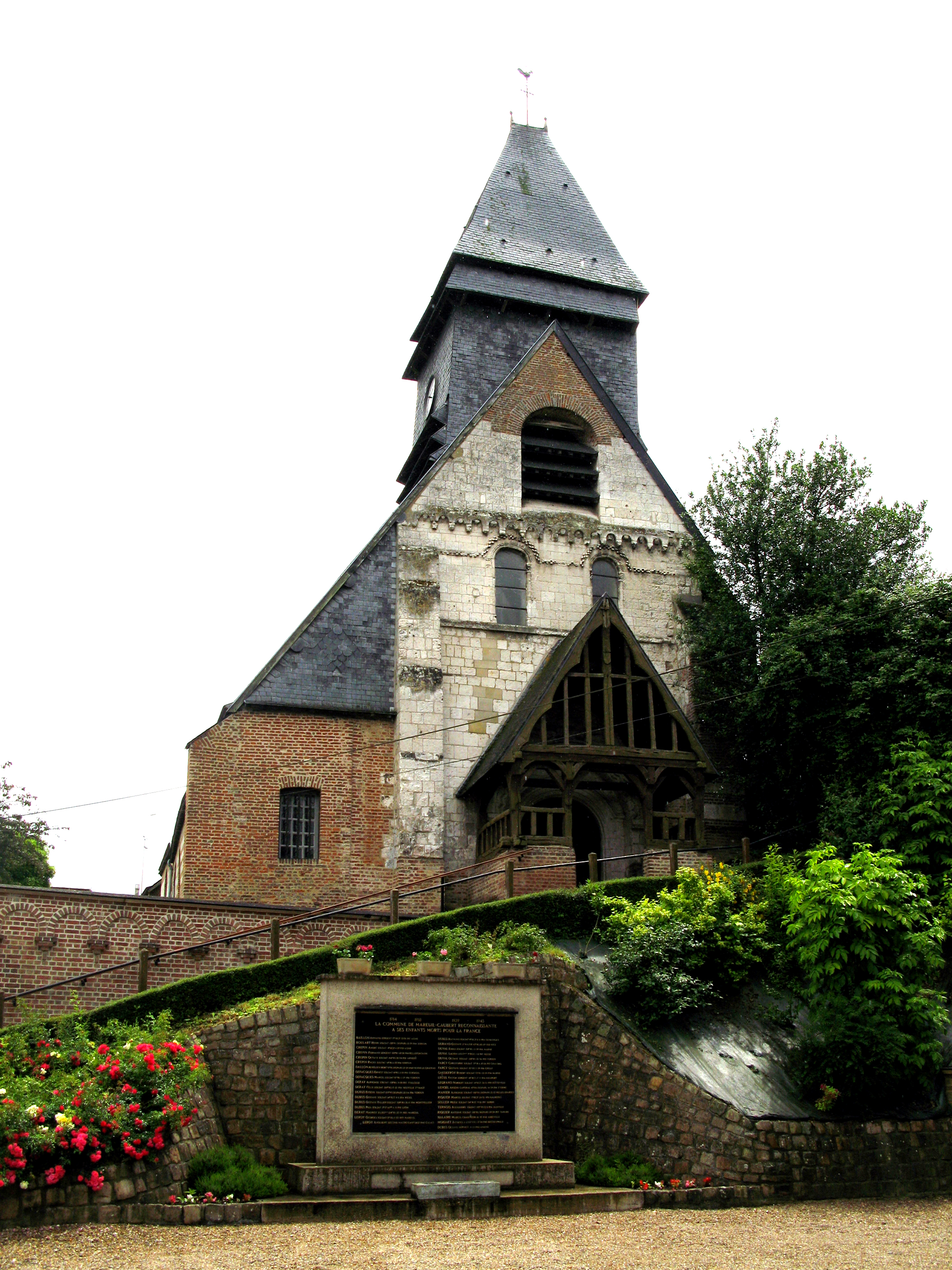 Mareuil-Caubert (Somme, France) - L'église et le monument aux morts.